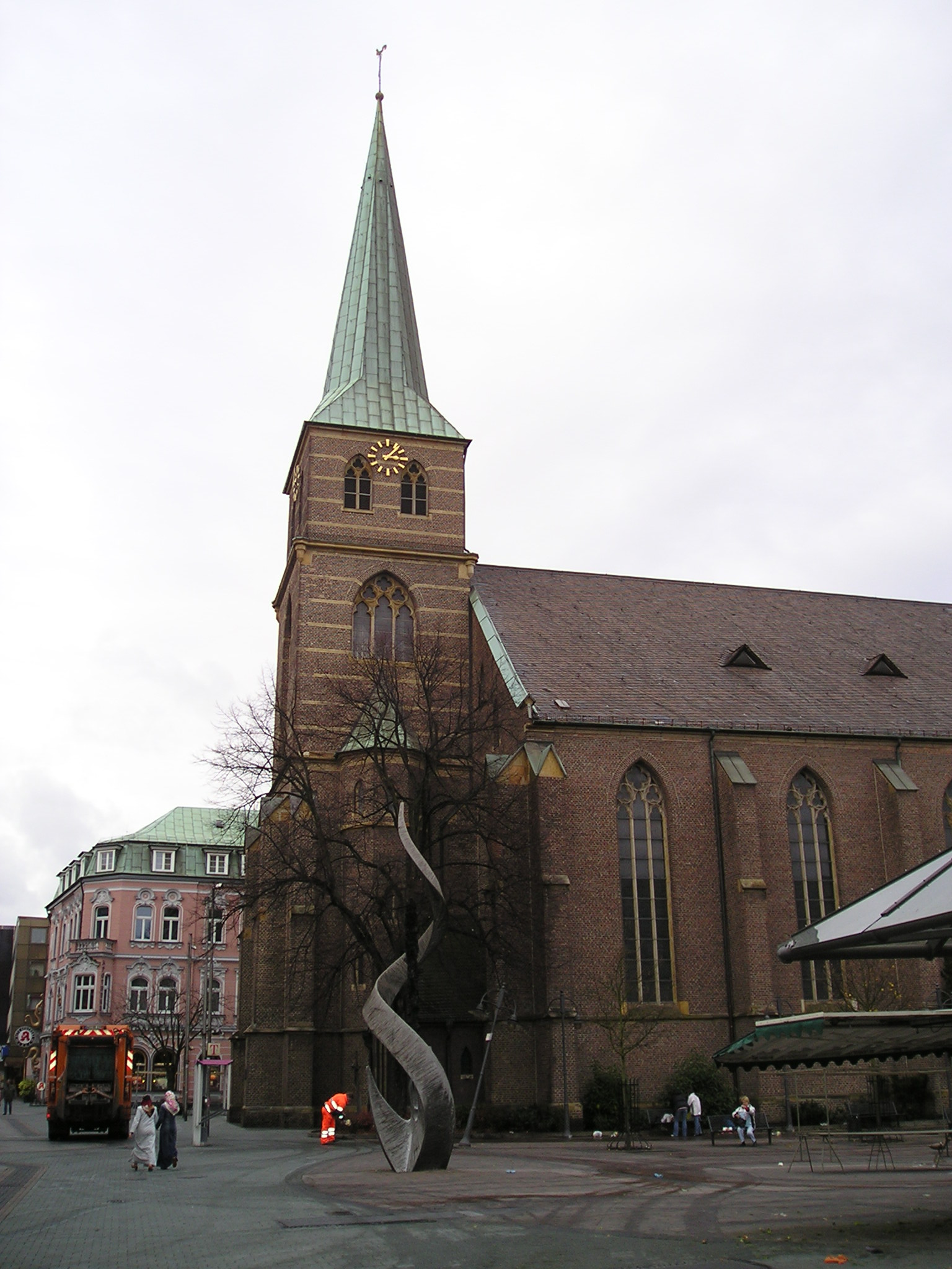 Katholische Propsteikirche St. Cyriakus and sculpture Blühendes by Helmut Schlüter in Bottrop